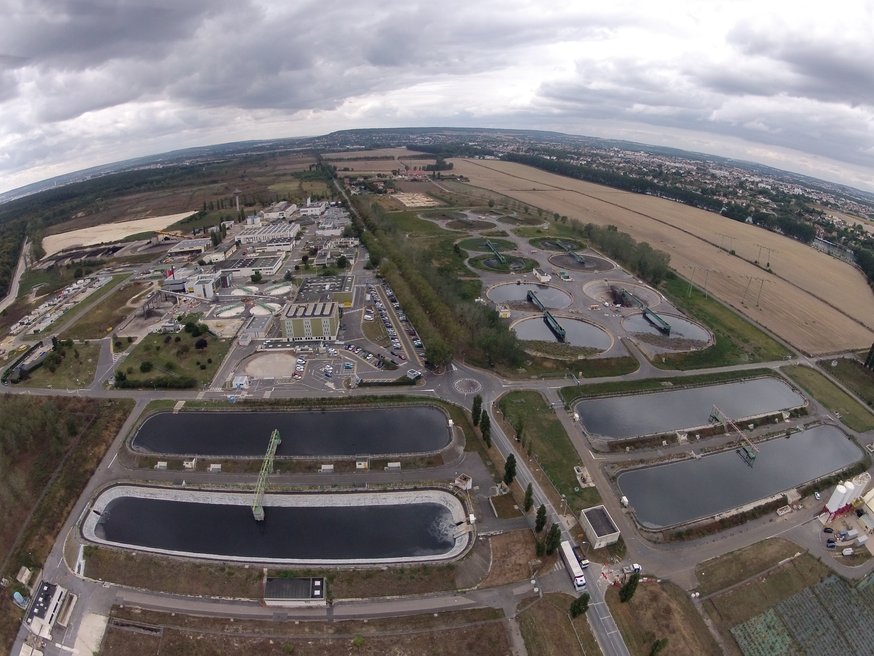 la plus grande station d'épuration d'Europe